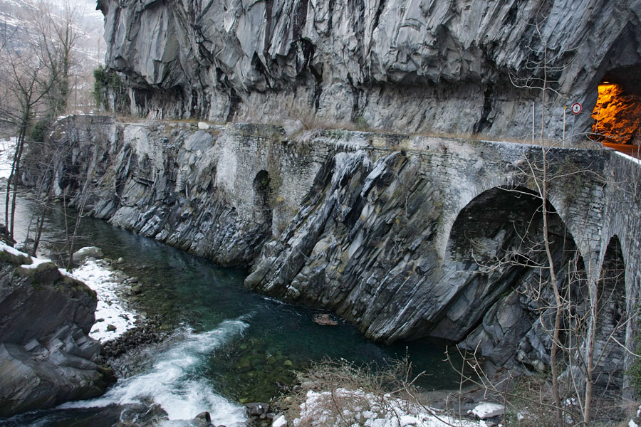 Il toce al passaggio della gola di Pontevaglio a Crevoladossola, prima di sbucare nella piana ossolana. Si riconosce il tracciato della vecchia strada della Valle Antigorio scavata sul fianco della montagna, poi sostituita dalla galleria